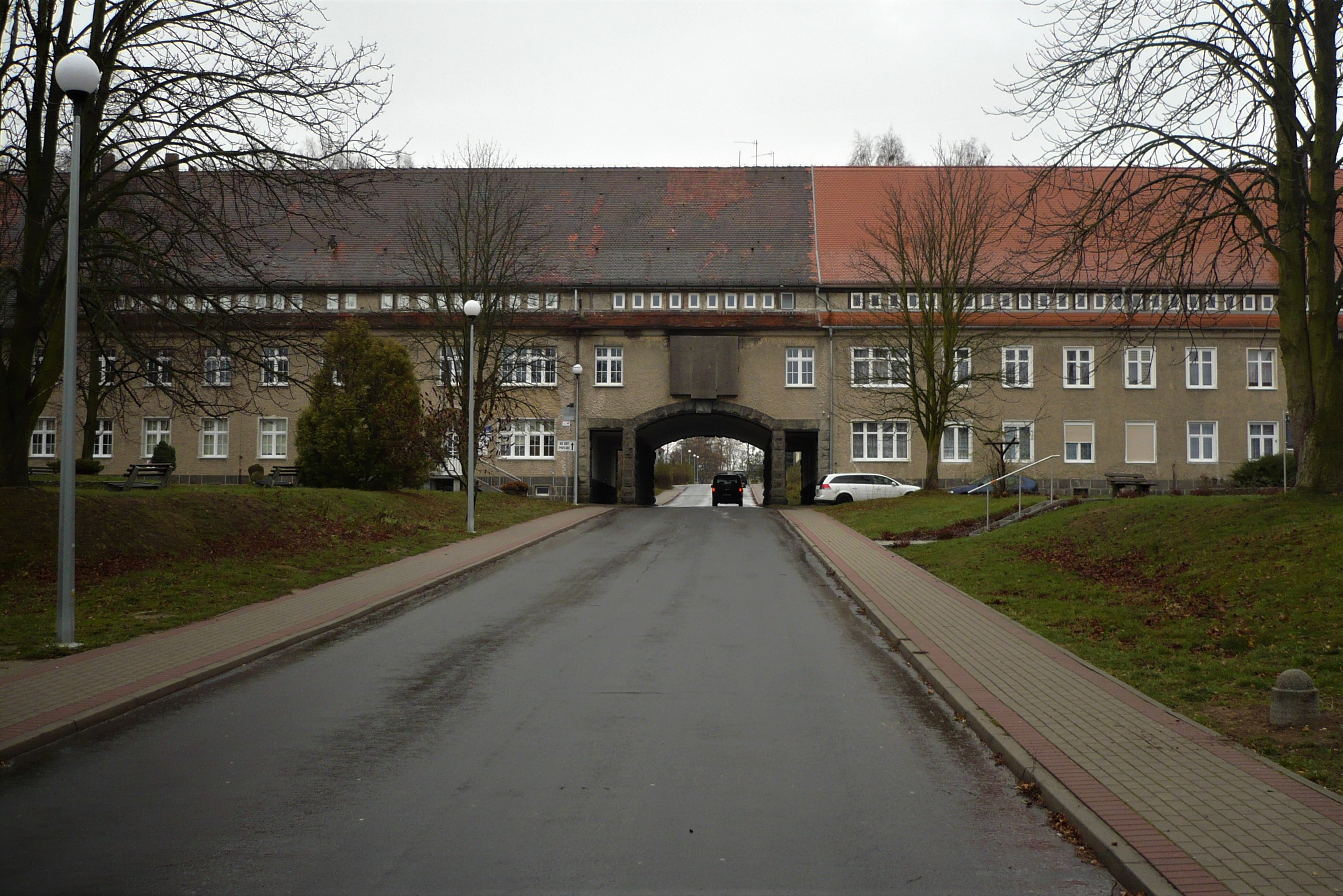 Sieniawka